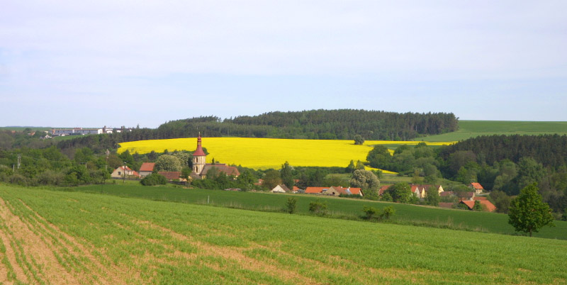 Všehrdy od jihovýchodu.